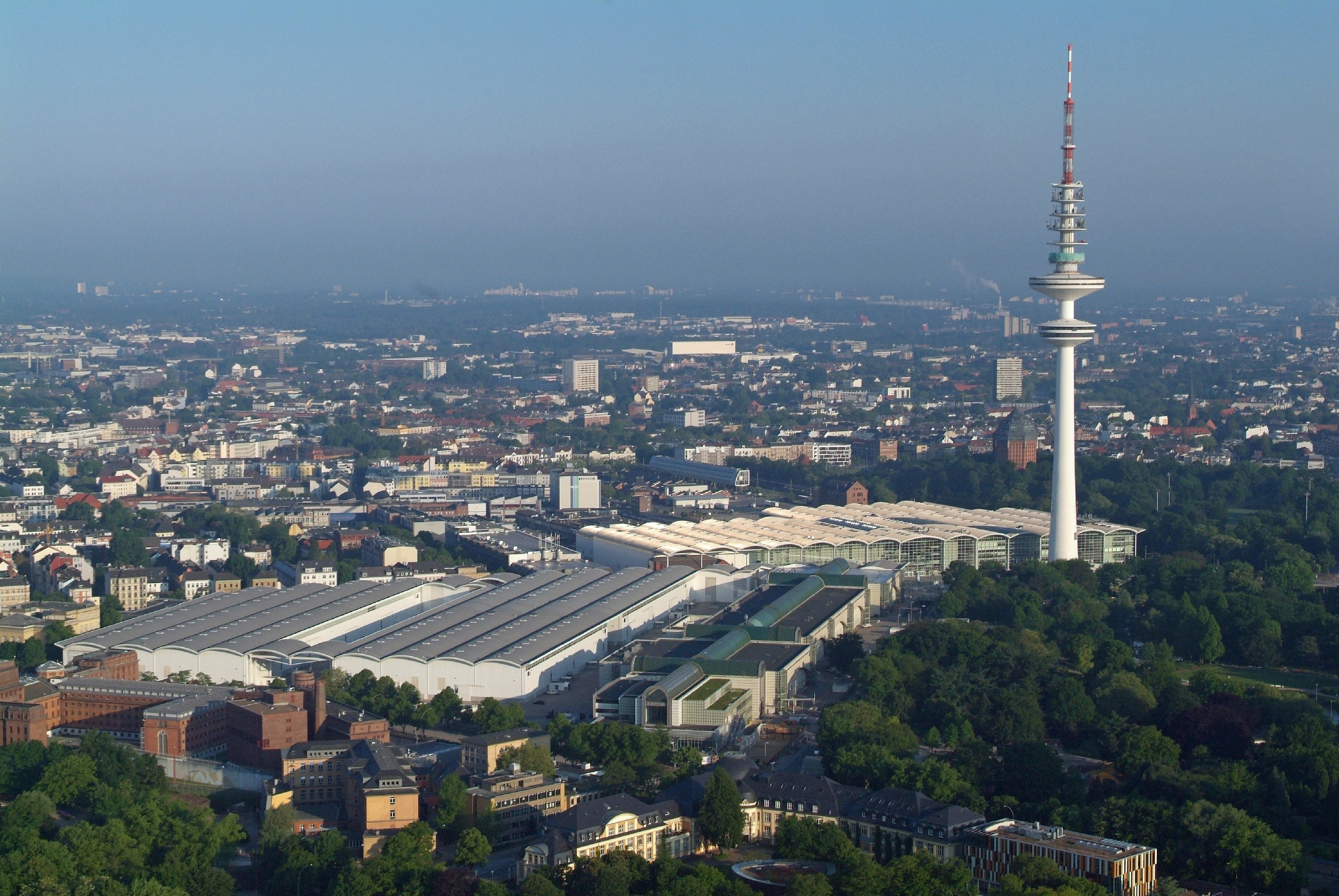 Messehallen und Heinrich-Hertz-Turm in Hamburg-St. Pauli. This is a photograph of an architectural monument.